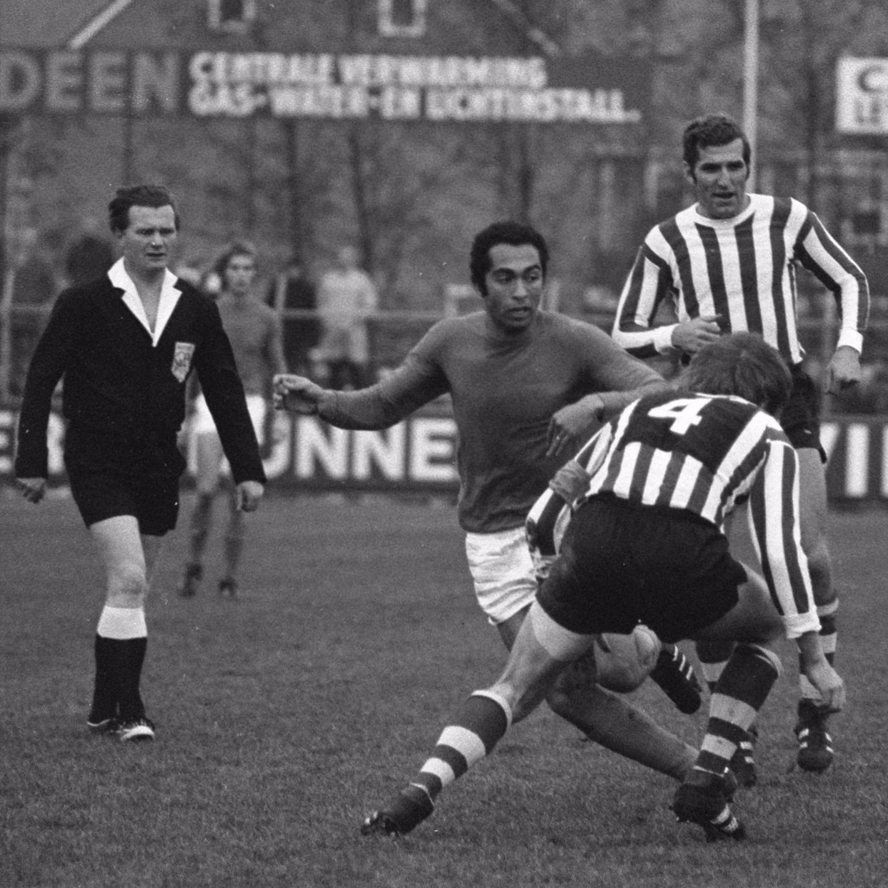 Volendam tegen Sparta 102, nieuwe Volendamspeler Ferreira (links) in duel met Henk Bosveld.